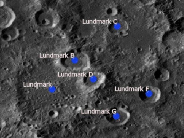 Cráter lunar Lundmark. Cráteres satélite. (Imagen LRO)